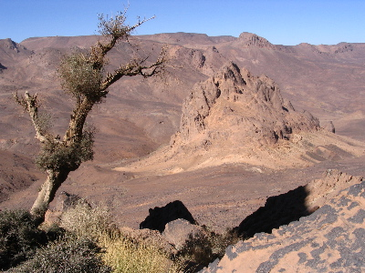 Sud de l'Algérie